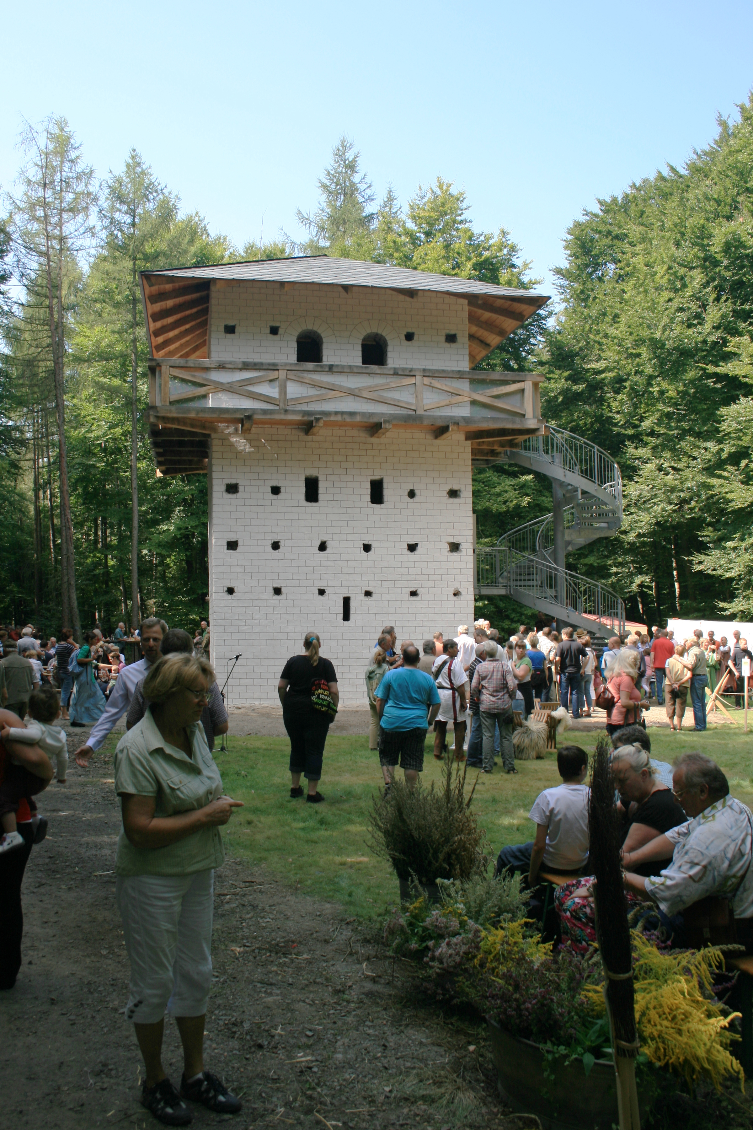 Einweihung des rekonstruierten Steinturmes am Wetteraulimes (Wp4/103 "Eckartshaeuser Unterwald") am 17.08.2013.